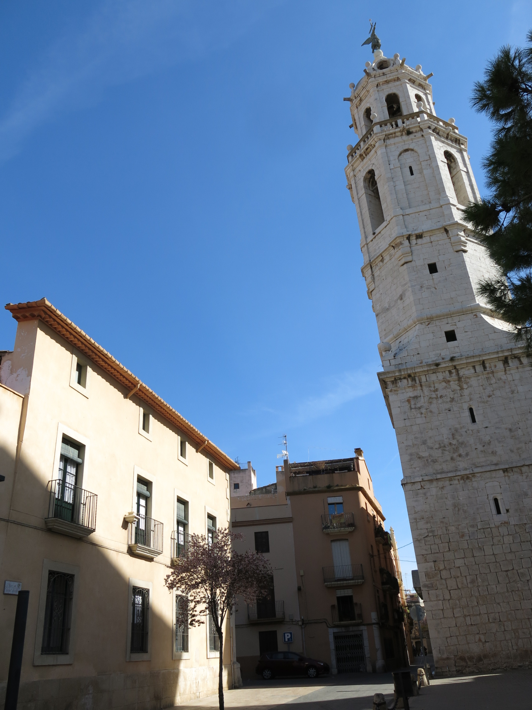 Plaça de Sant Antoni Abat (Vilanova i la Geltrú)